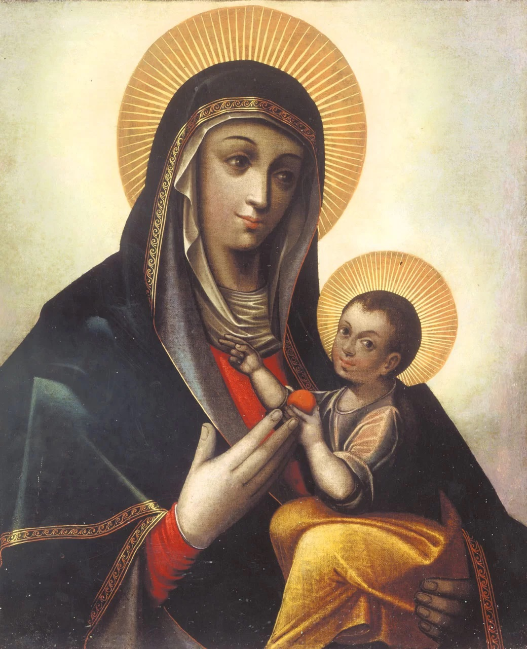 Беларуская (тарашкевіца): Абраз Маці Божай Будслаўскай (Maci Božaja Budsłaŭskaja)